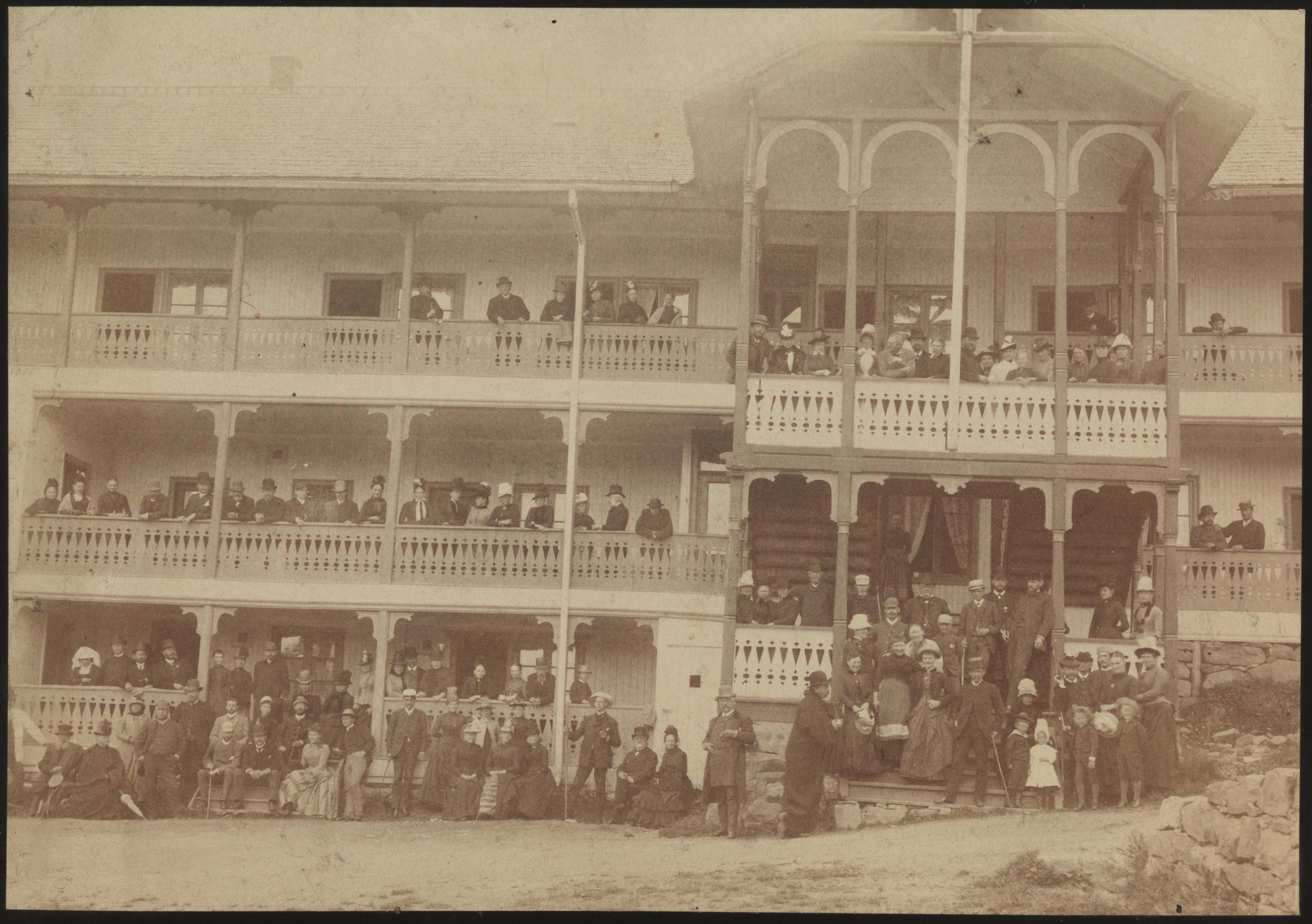 Bildet er hentet fra Nasjonalbibliotekets bildesamling